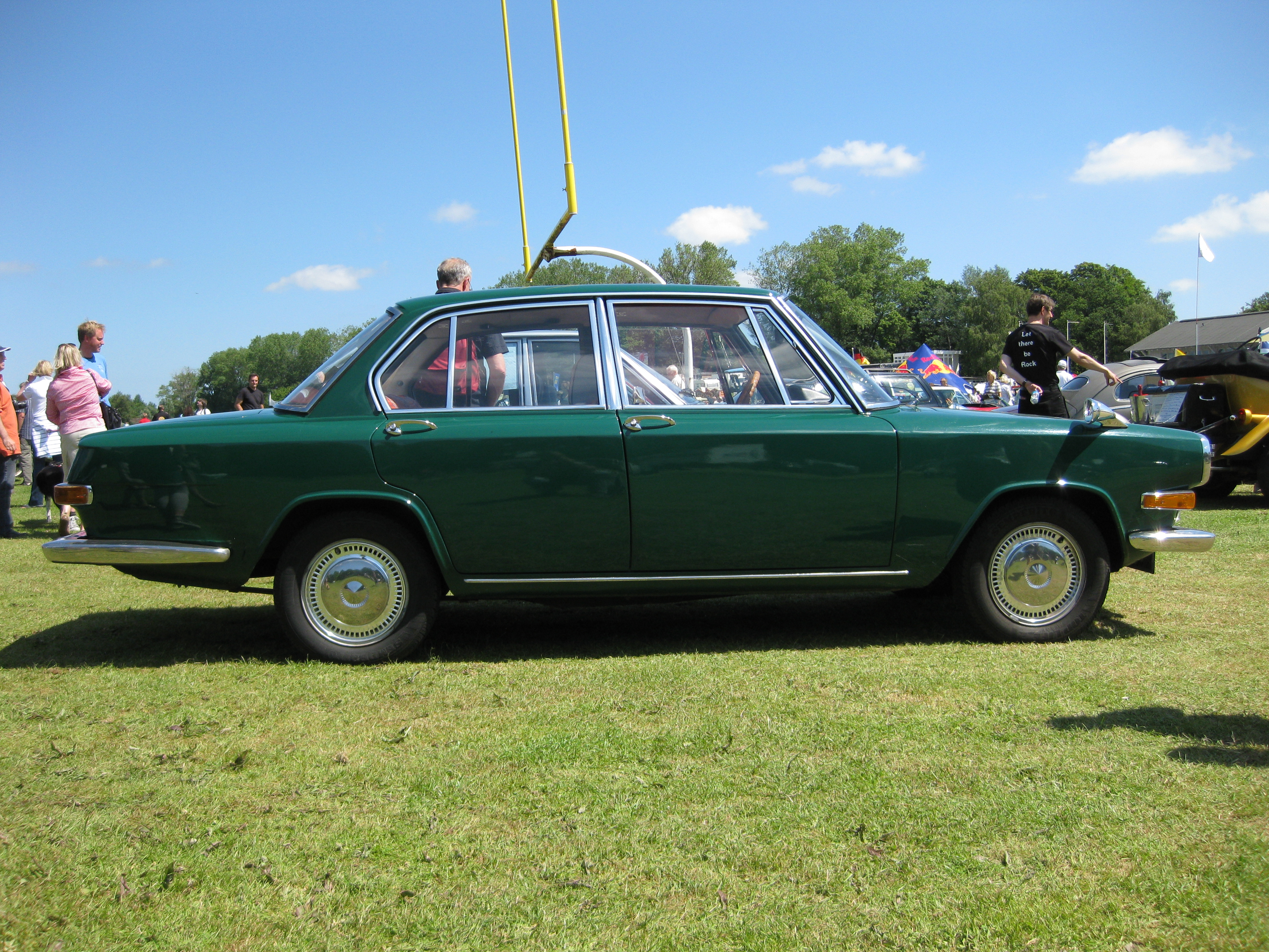 Glas 1700 Seitenansicht